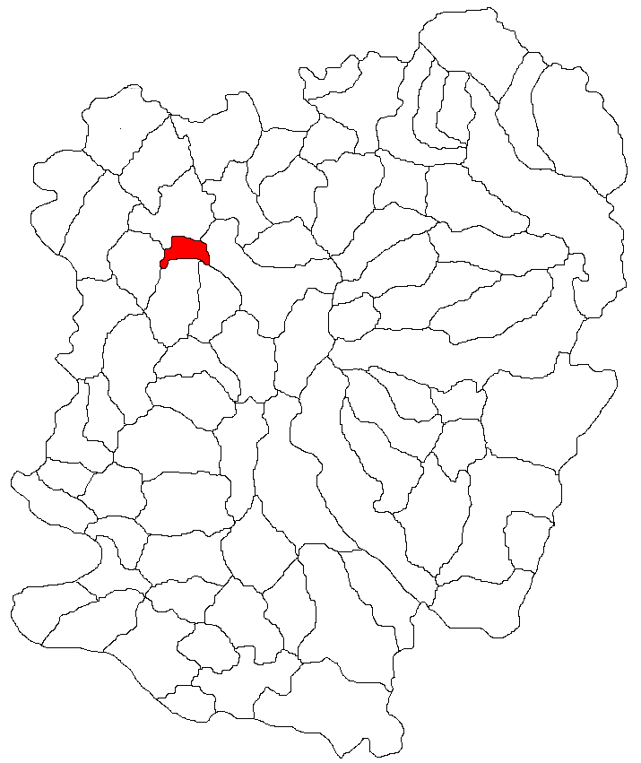 Categorie:Hărţi ale judeţului Caraş-Severin